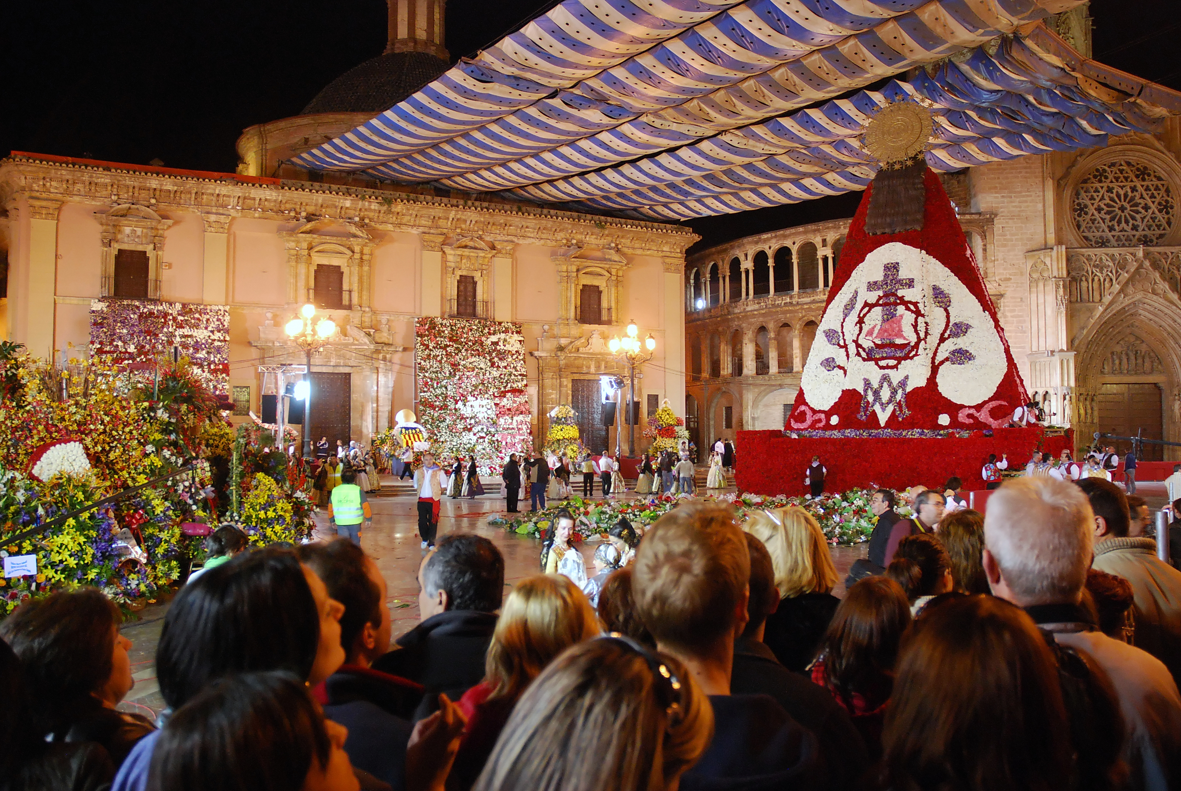 Ofrenda a la Virgen en Fallas 2008. Últimas ofrendas